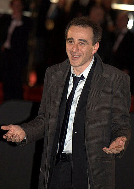 Elie Sémoun à la cérémonie des César du cinéma